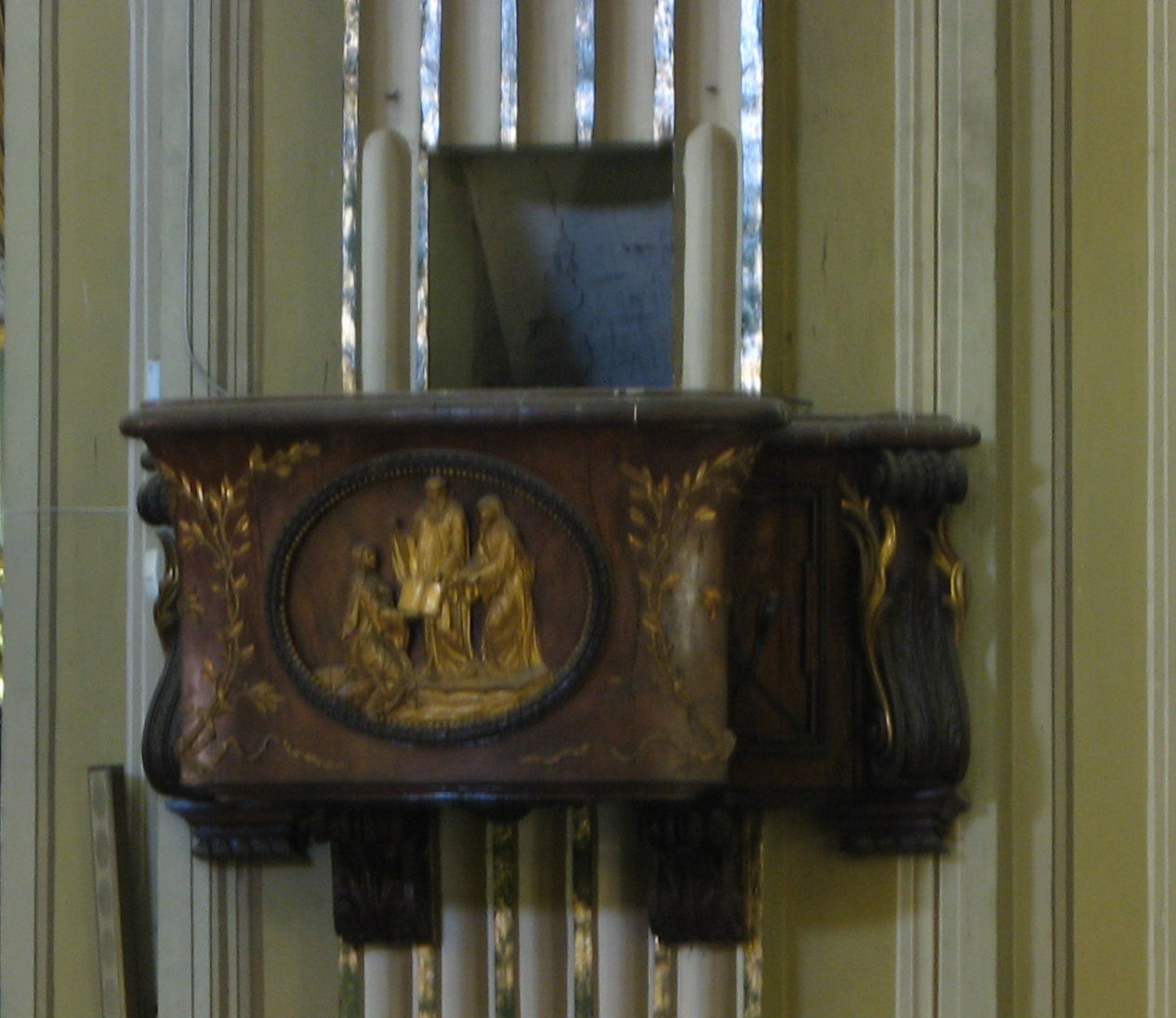 Genzano di Roma: Pulpito ligneo nella navata della Chiesa della SS Trinità (XVIII secolo)